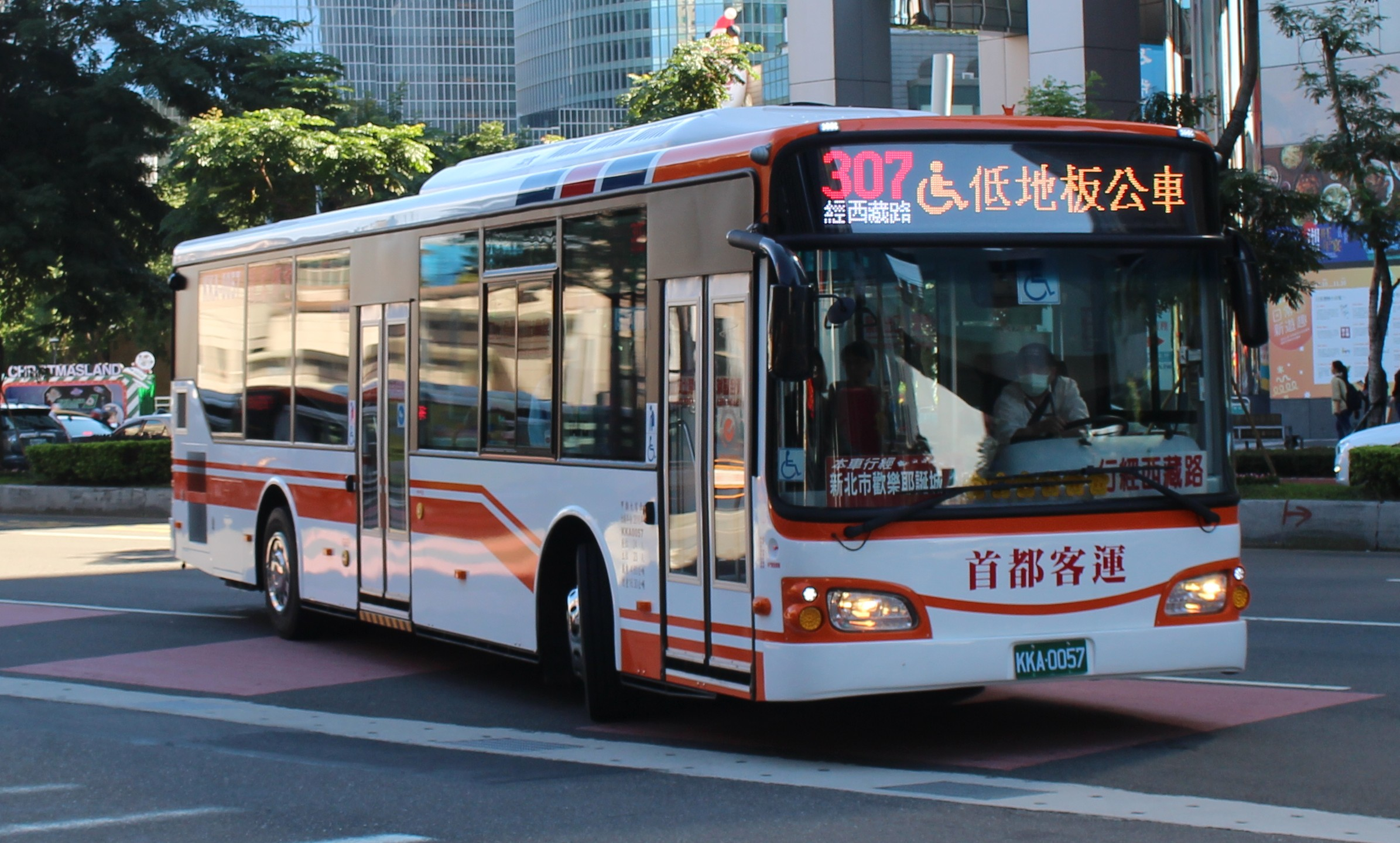 首都客運2018 HINO HS8JRVL-UTF KKA-0057 307